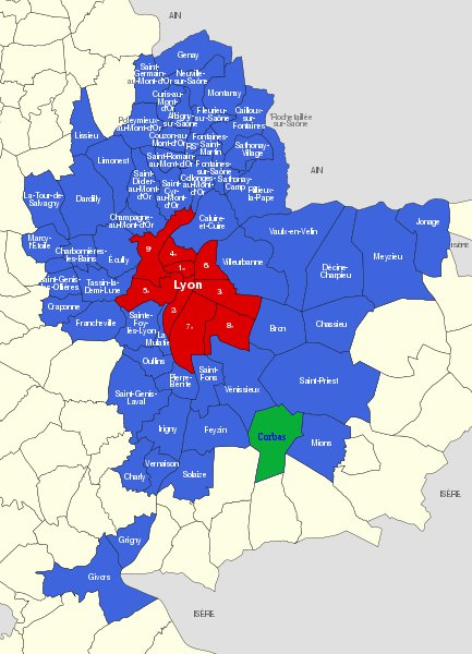 Communes du Grand Lyon, en vert Corbas